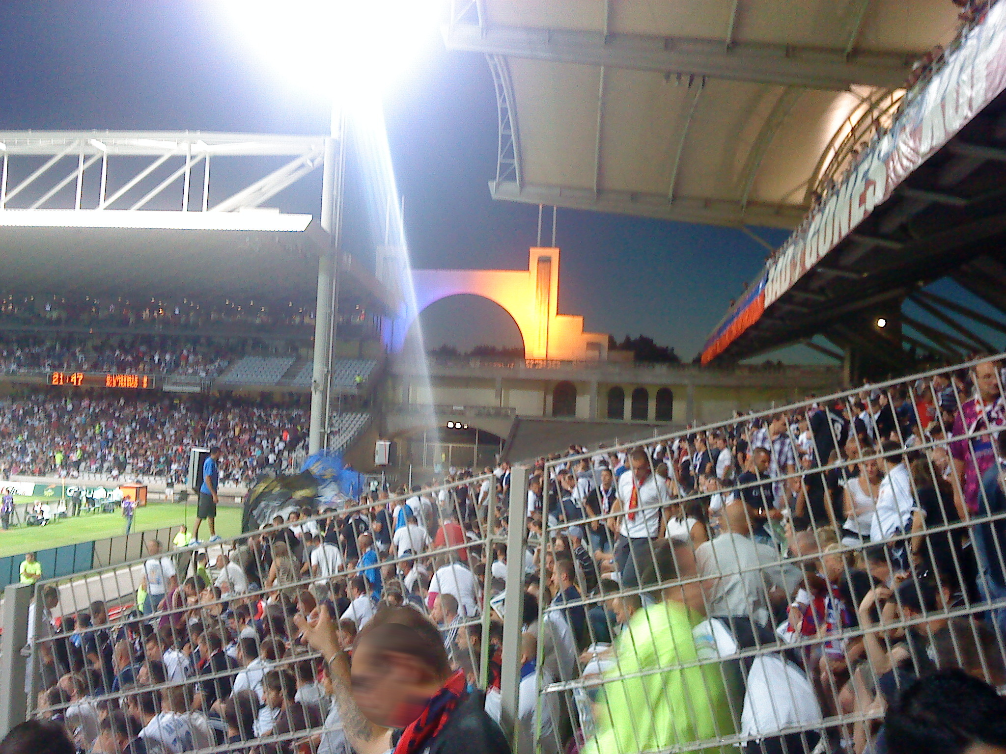 Tribune des supporters lyonnais Bad Gones lors du match opposant l'Olympique lyonnais à l'AS Monaco lors de la première journée du championnat de France de Ligue 1 2010-2011.